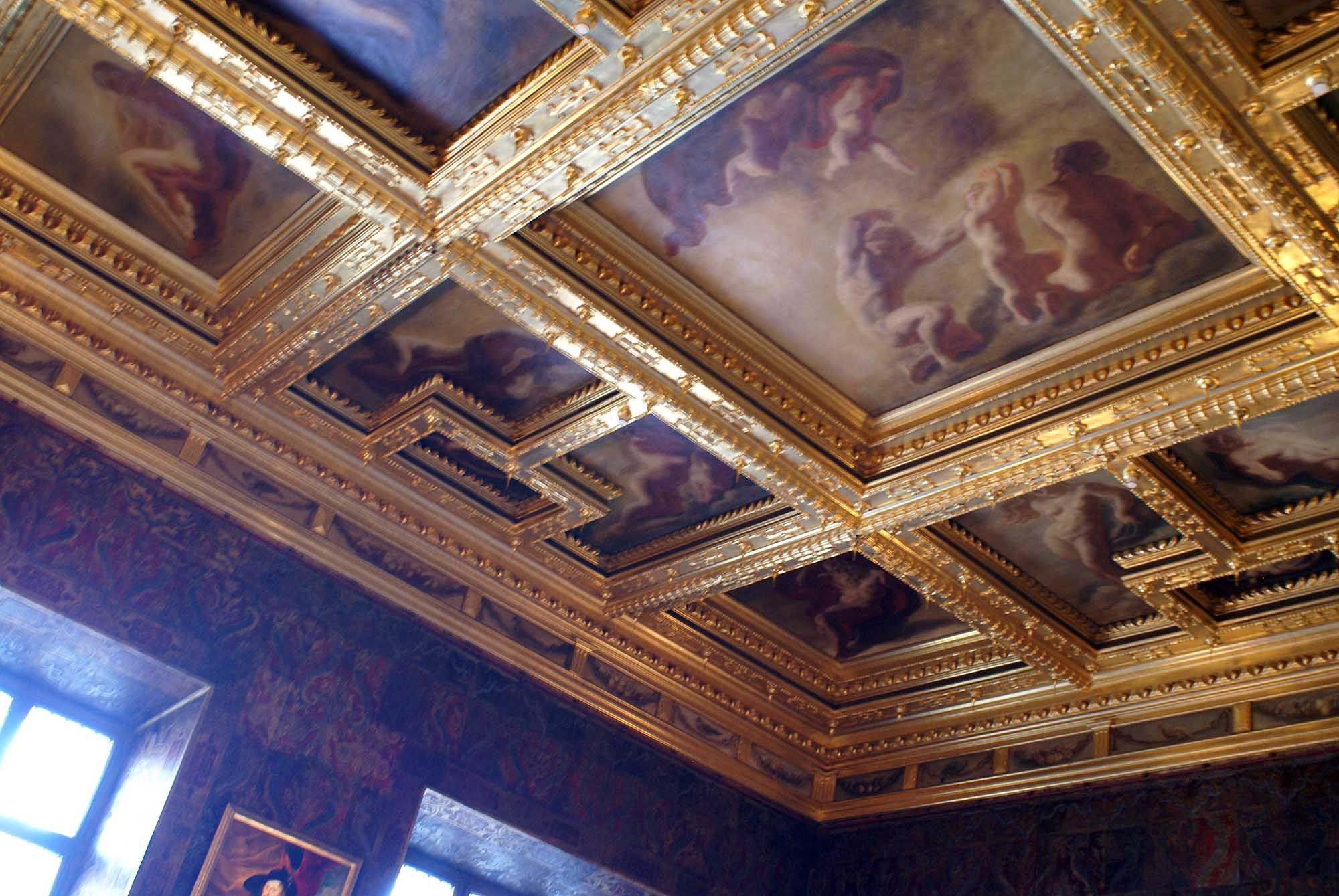 Kraków, zespół Wzgórza Wawelskiego